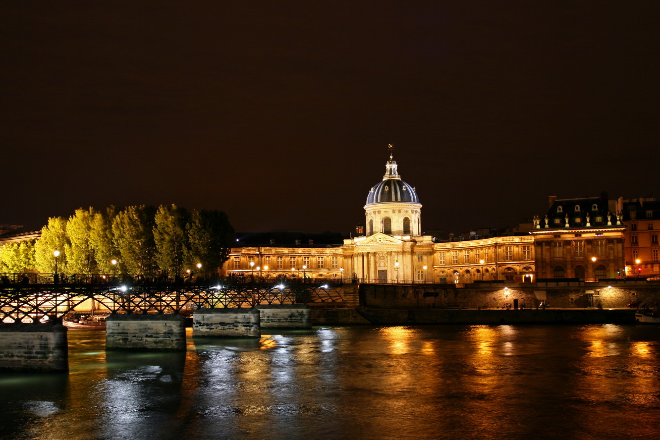 Institut de France